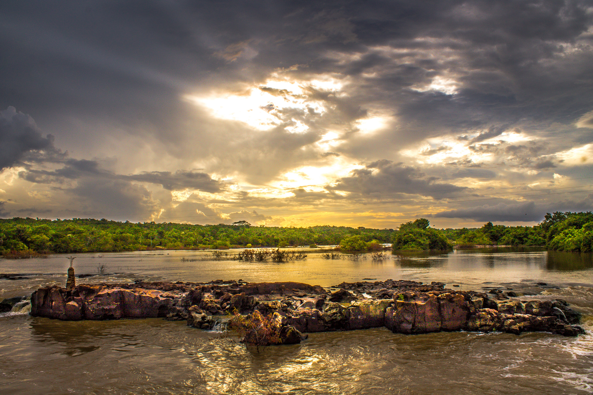 As chuvas, além de alegrarem a vida do sertanejo no Piauí com a cheia das barragens e açudes, também estão retomando o encanto dos parques ecológicos. A Cachoeira do Urubu é um dos exemplos. Localizada entre as cidades de Esperantina e Batalha, no norte piauiense, ela já mostra um cenário diferente com a força do rio Longá. Localizada a 180 km de Teresina, no Parque Ecológico Cachoeira do Urubu, inaugurado em 1993, ela recebe visitantes principalmente no primeiro semestre do ano, meses de chuvas em que as águas são mais fortes, um incremento ao espetáculo da natureza. Nos últimos meses, por conta da seca no rio Longa, o que se via era um cenário de desolação do local, com poucas águas e abandono do Parque. Mas com os índices de chuva do mês de janeiro, as águas começaram a ficar mais fortes.